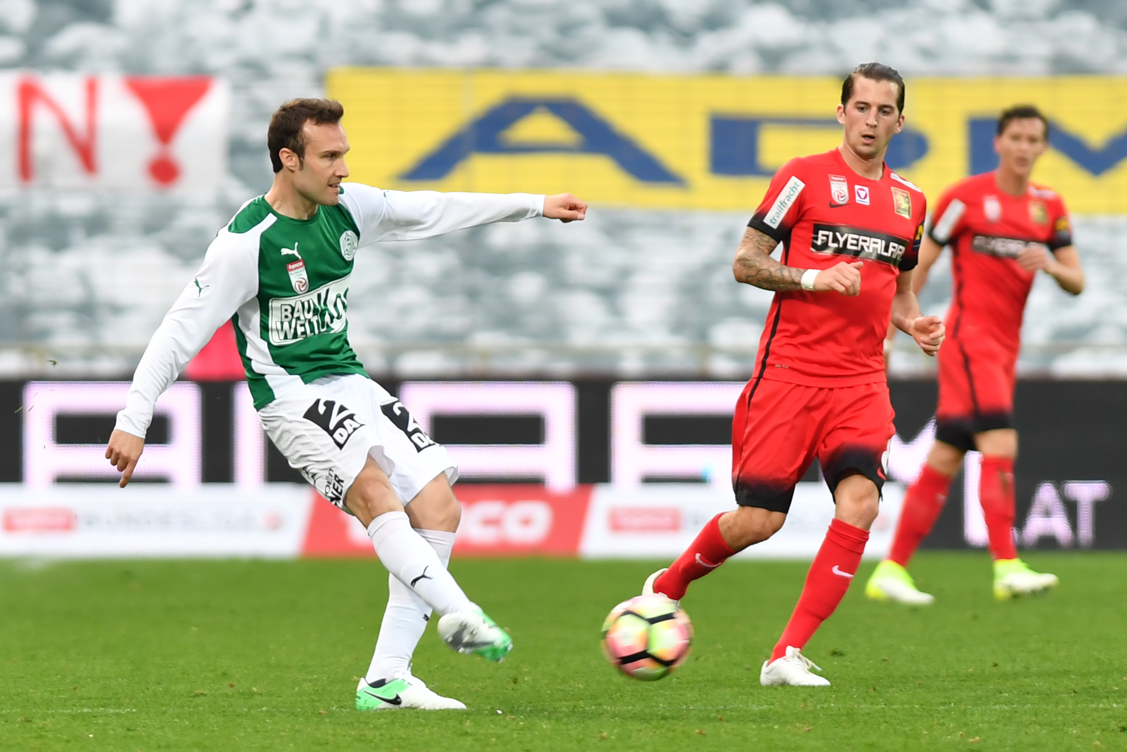 Maria Enzersdorf, Österreich, 8.4.2017, Fussball Bundesliga - FC Flyeralarm Admira vs SV Mattersburg. Bild zeigt Cesar Ortiz (SVM) und Christoph Knasmuellner (ADM).